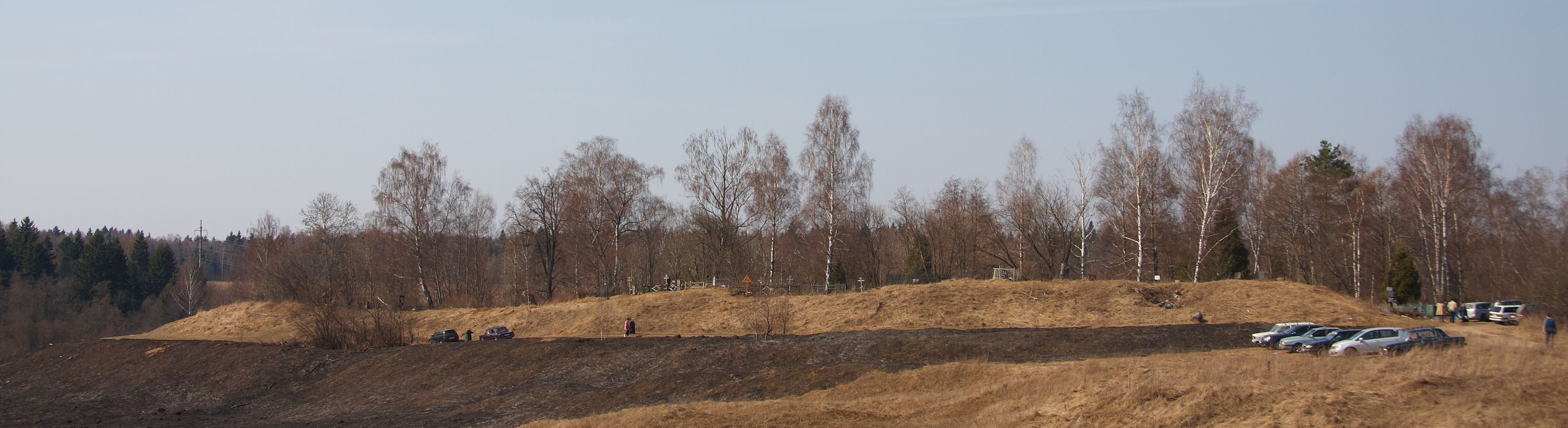 Общий вид крепостного вала в селе Радонеж